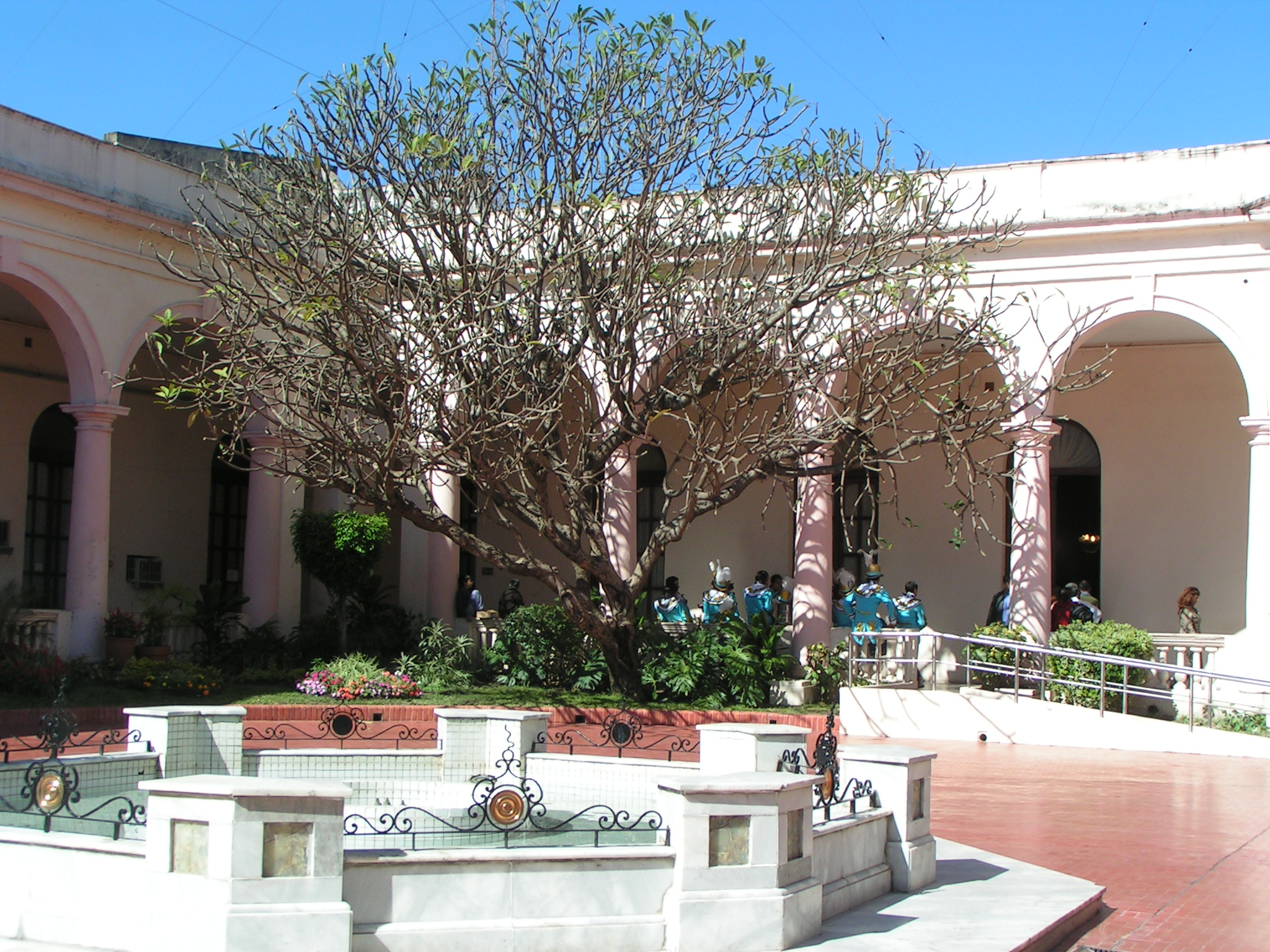 Patio interno de la Casa de Gobierno, Corrientes.